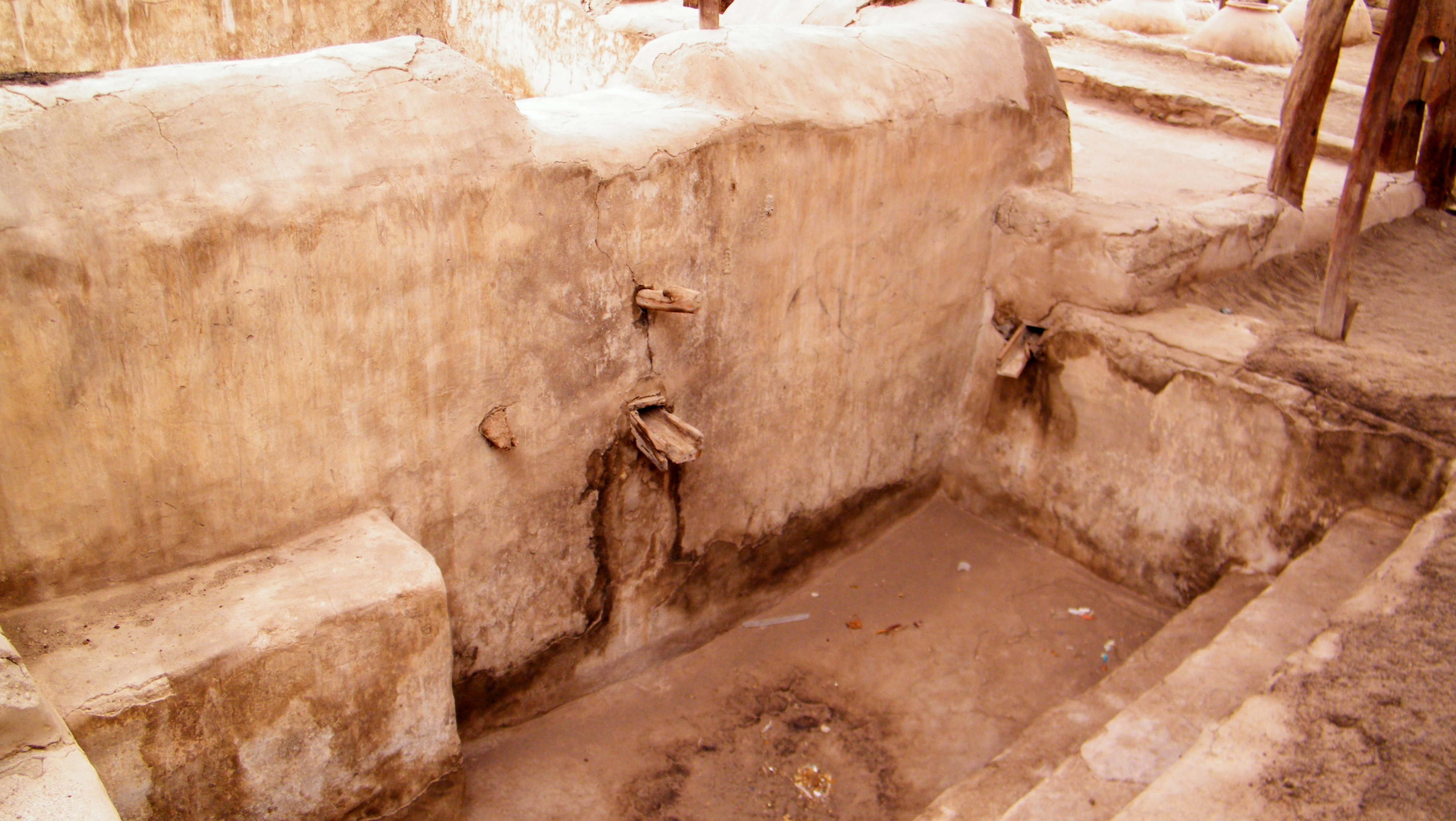 Lagar de Matilla This is a photo of a national monument in Chile: 1103